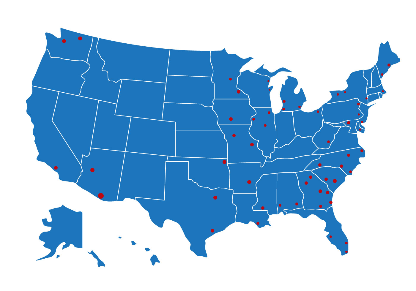 Borobil gorriz maratuta dagoena, estatu batuetako zentral nuklearrak dira.